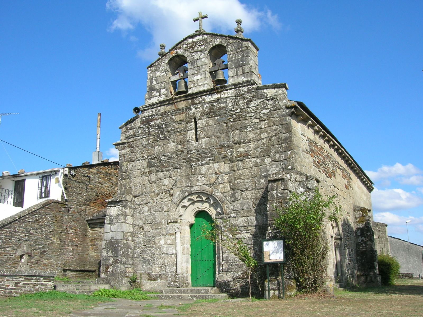 Iglesia Parroquial de Santiago de Baamonde. Del siglo XIII, combina los estilos románico y gótico.